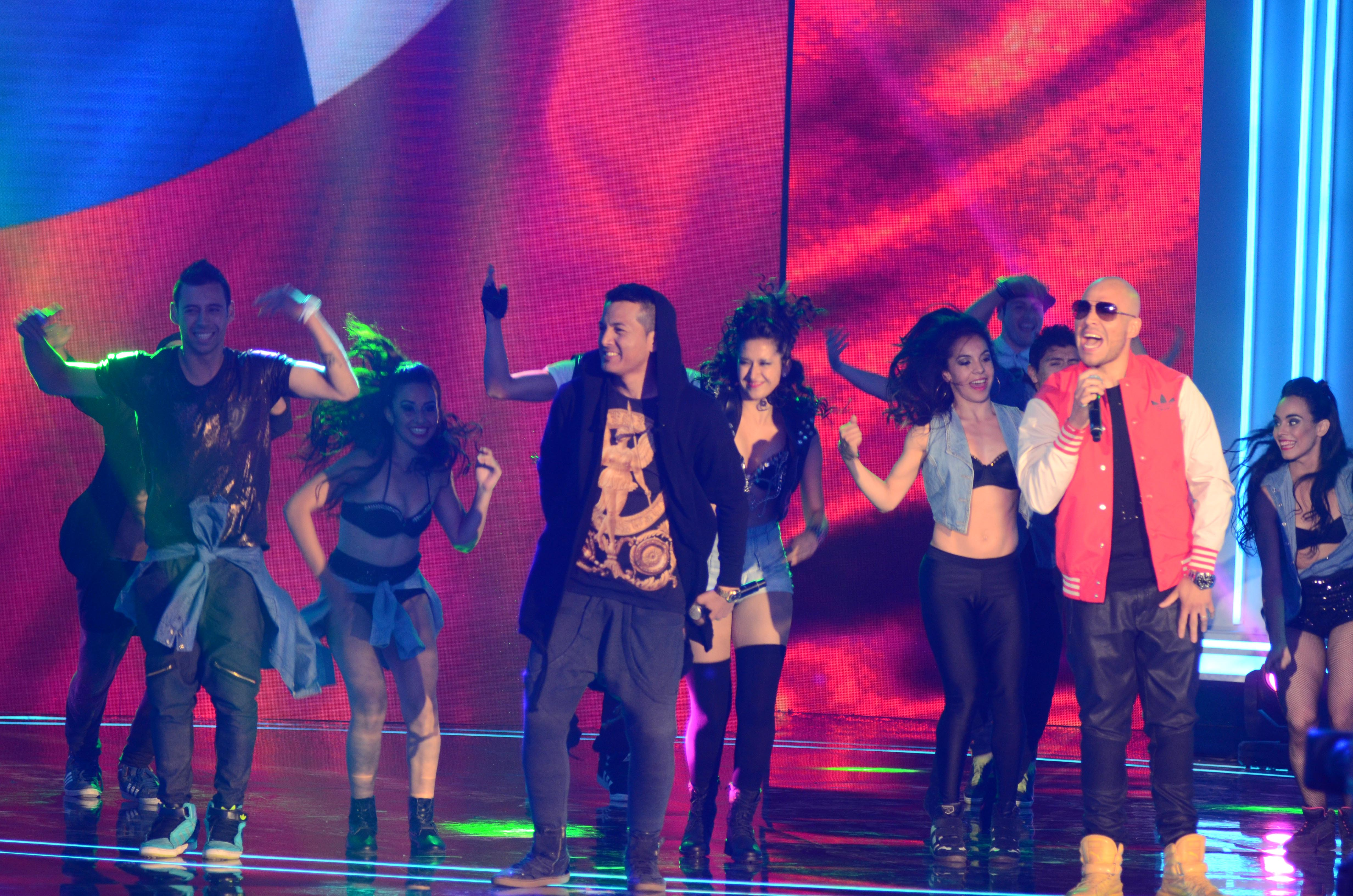 Ministro Elizalde asiste a la Ceremonia Inaugural de la Teletón